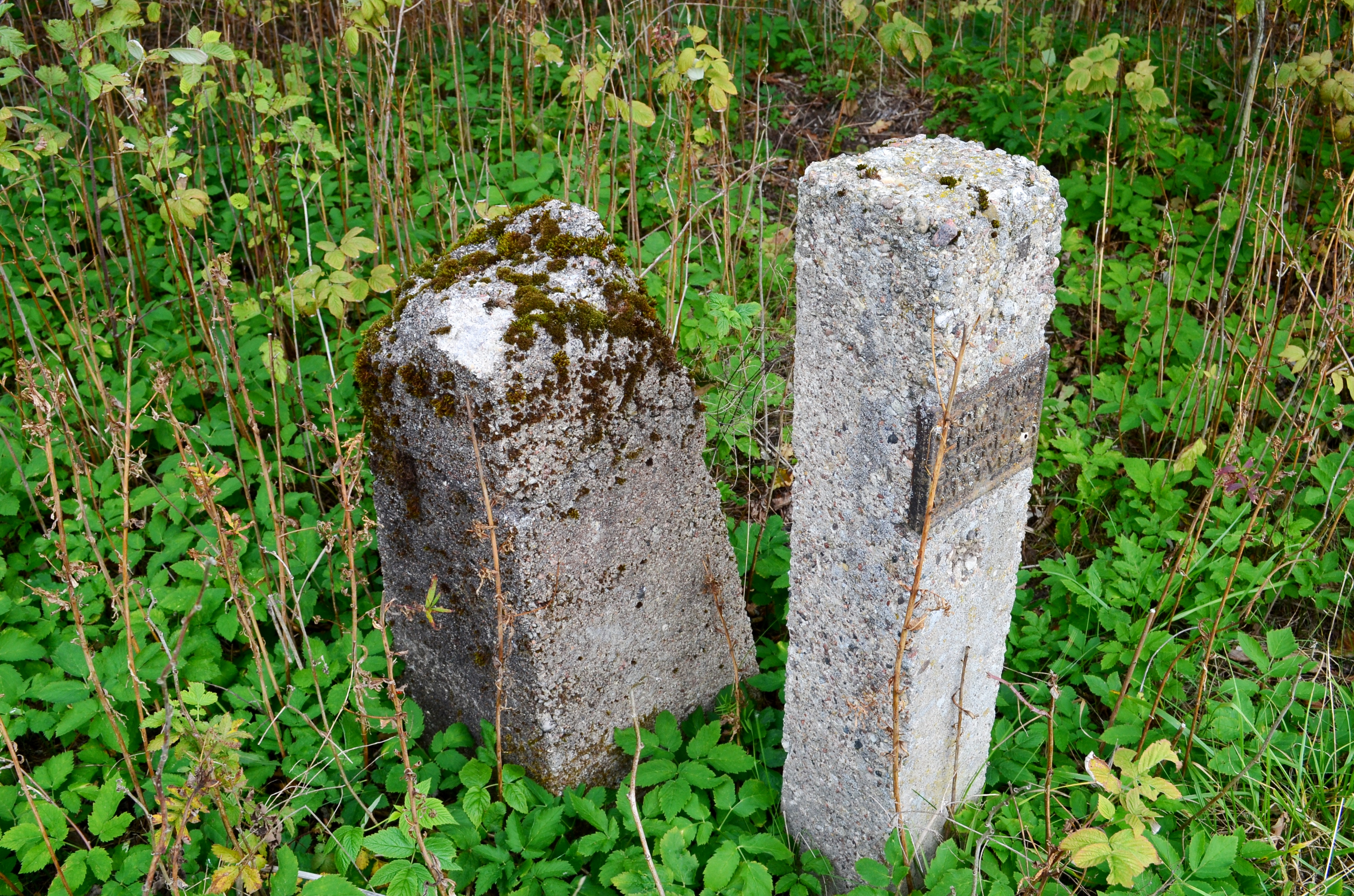 Geodezinis ženklas ant Girgždūtės, Telšių raj.